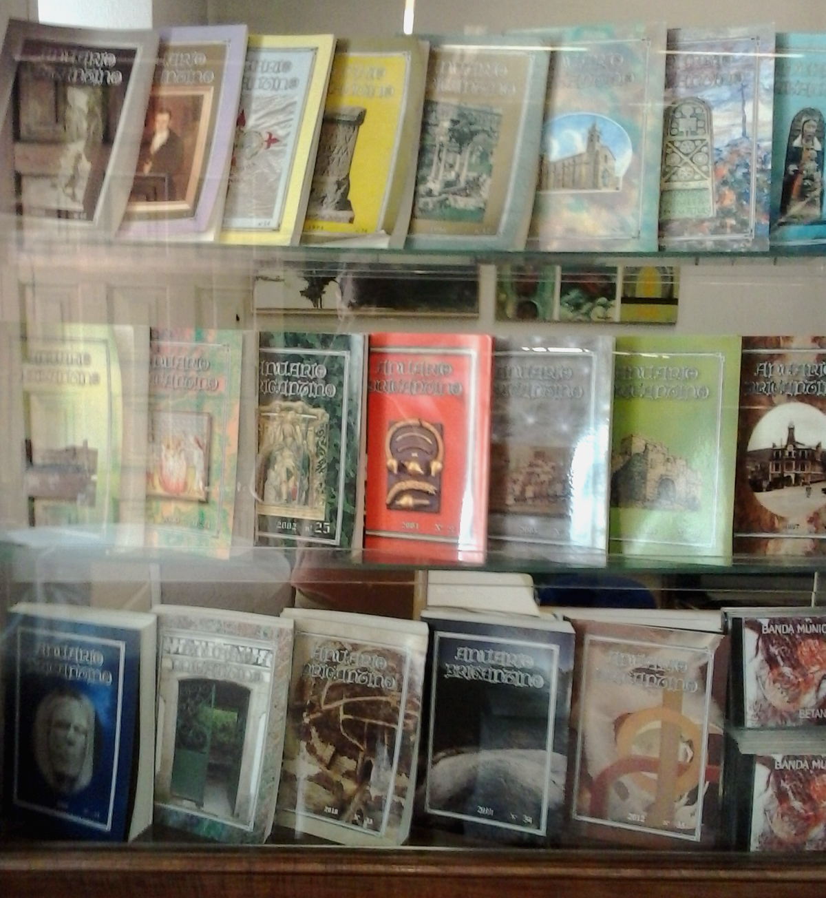 Portadas do Anuario Brigantino no Museo das Mariñas de Betanzos, A Coruña Galiza Spain